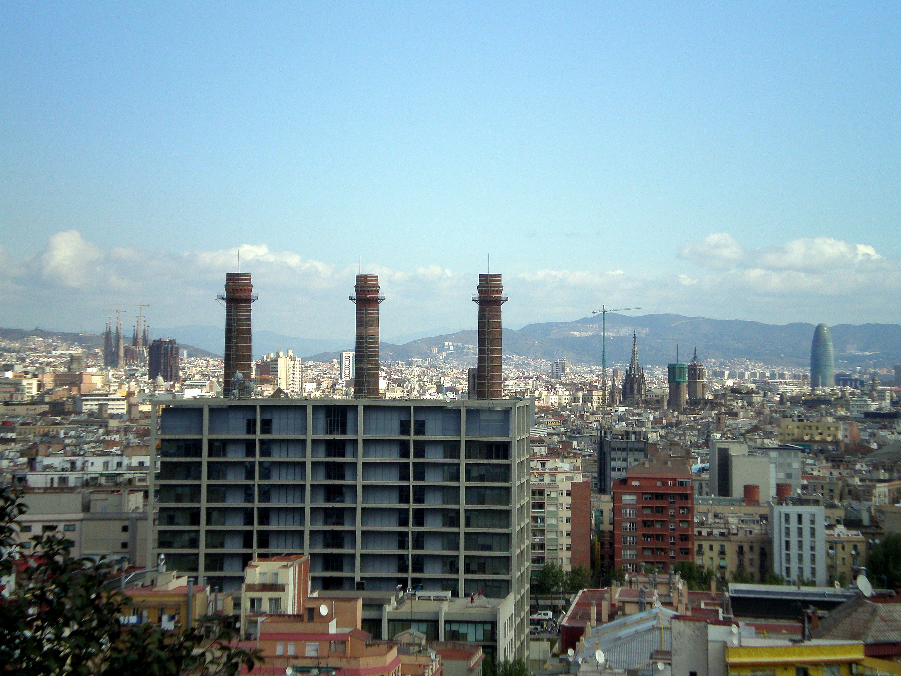 Vista parcial de la ciutat des de la part alta del Poble Sec.